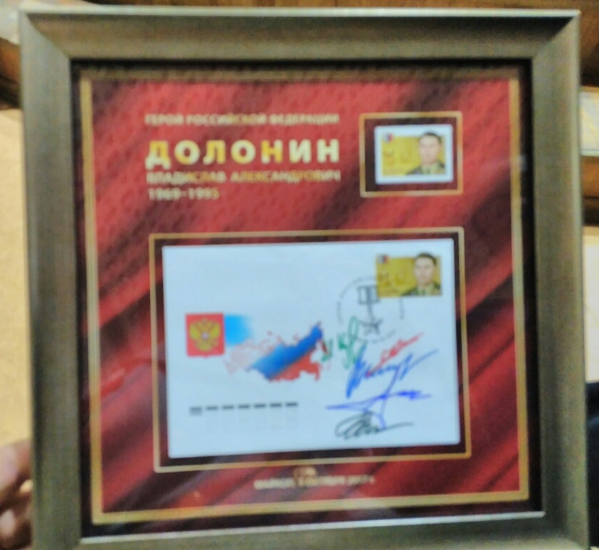 Почтовая марка, посвящённая Герою России Долонину Владиславу Александровичу. 5.10.2017 Майкоп.